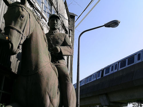 中文（台灣）: 臺北捷運北投站至復興崗站之間一座蔣中正銅像。